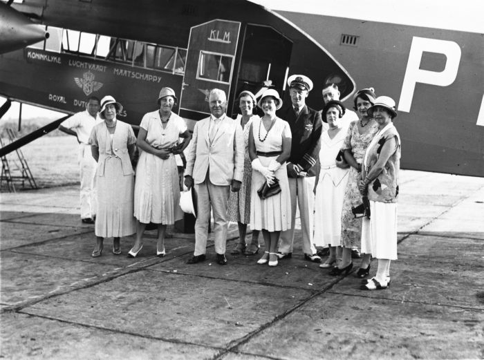 Foto. Groepsportret voorafgaand aan het vertrek van directeur Rendorp van de KNILM per Fokker F-XVIII van de KLM naar Nederland